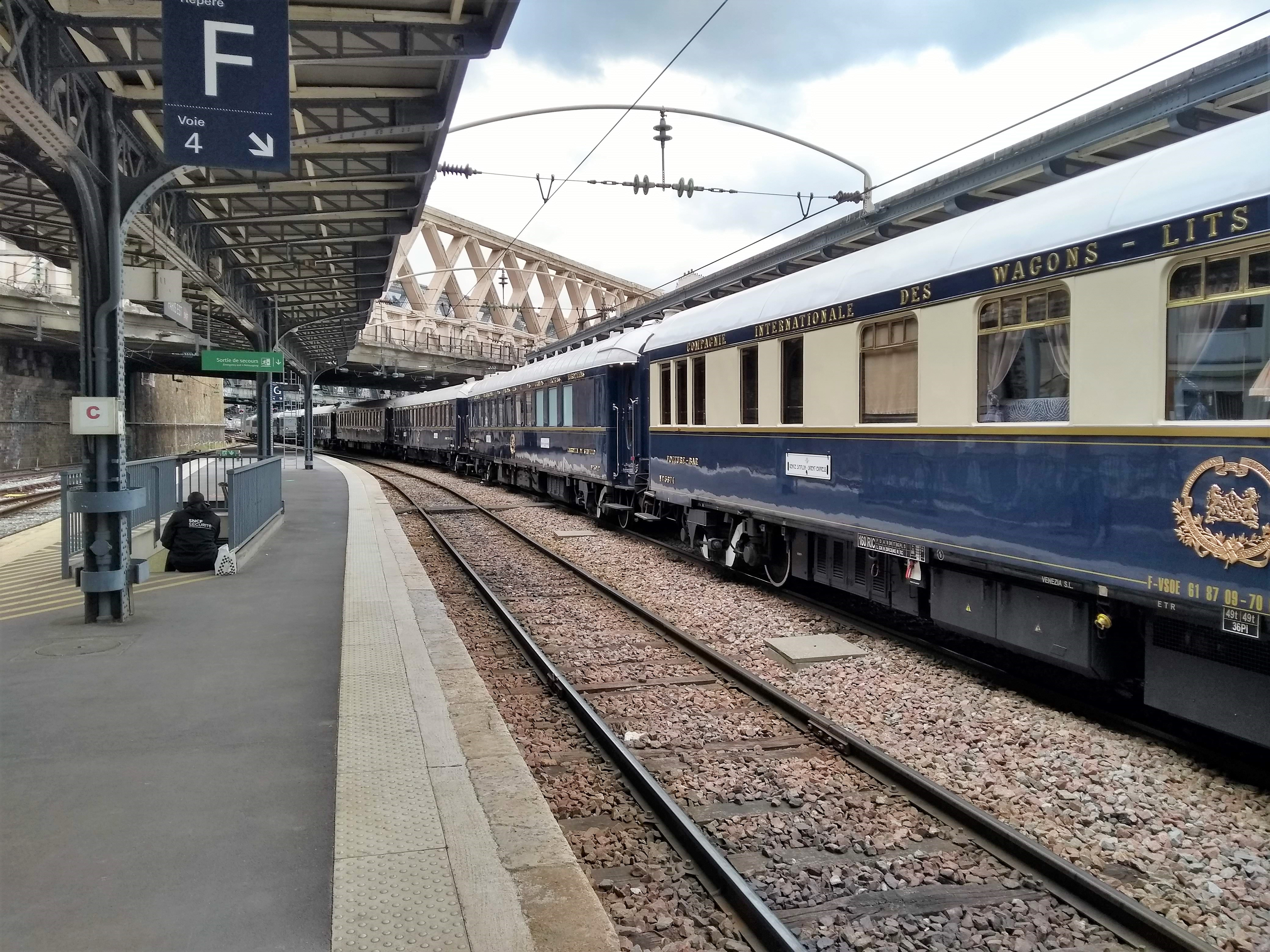 Gare de Paris-Est: L'Orient-Express est désormais prêt pour le départ vers Venise.